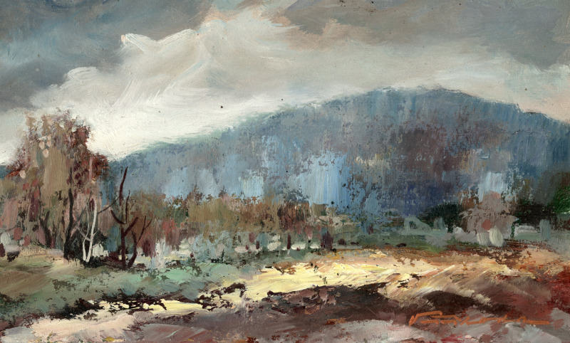 Stanislav Příhoda